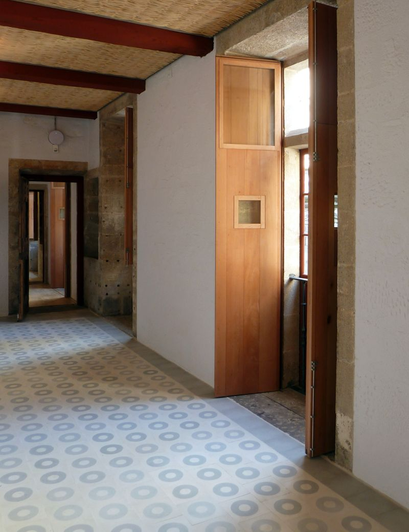 Interior de la Casa del Cabildo después de la intervención de restauración llevada a Cabo por el Consorcio de Santiago.